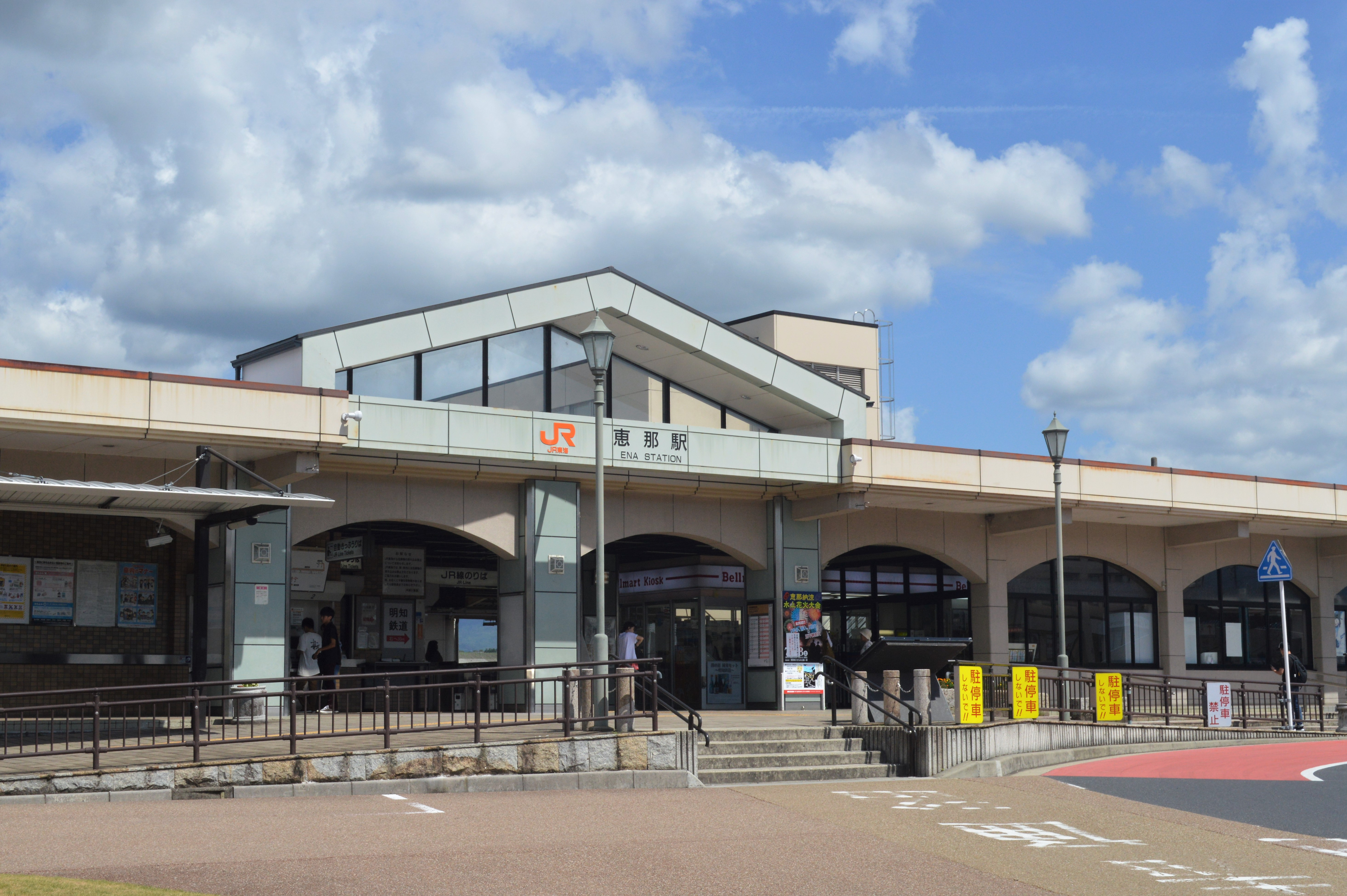 岐阜県恵那市にあるJR中央本線恵那駅。